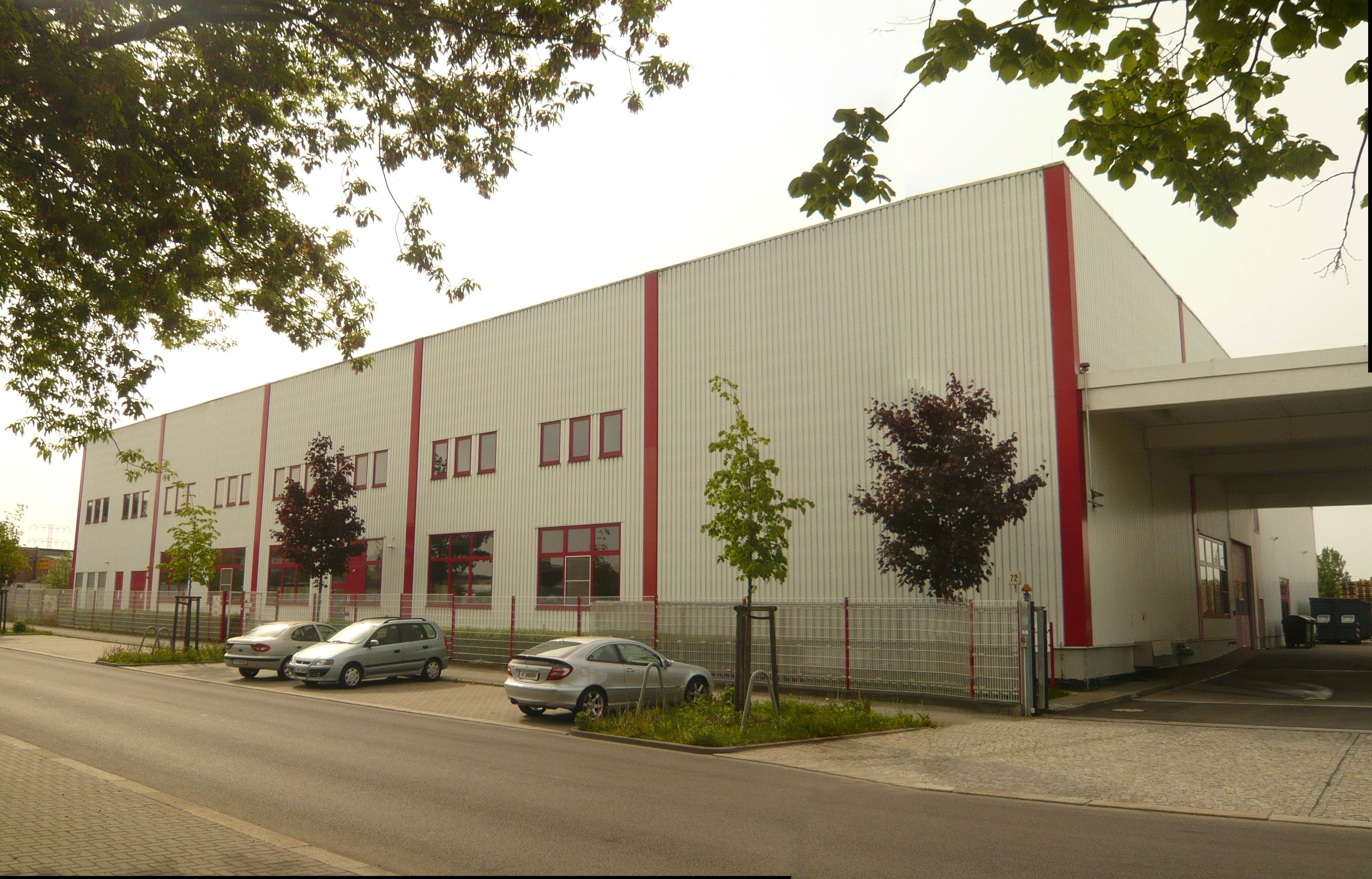 Berlin-Lichtenberg, Standort von BärenSiegel GmbH